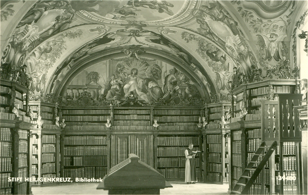 Postkarte der Stiftsbibliothek Heiligenkreuz, um 1915